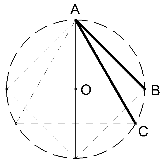 Quadrado e triângulo equilátero inscritos